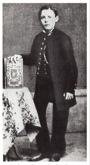 Charles Péguy à 8 ans en 1885, photo dans son uniforme de pensionnaire au lycée d'Orléans, photographe anonyme.